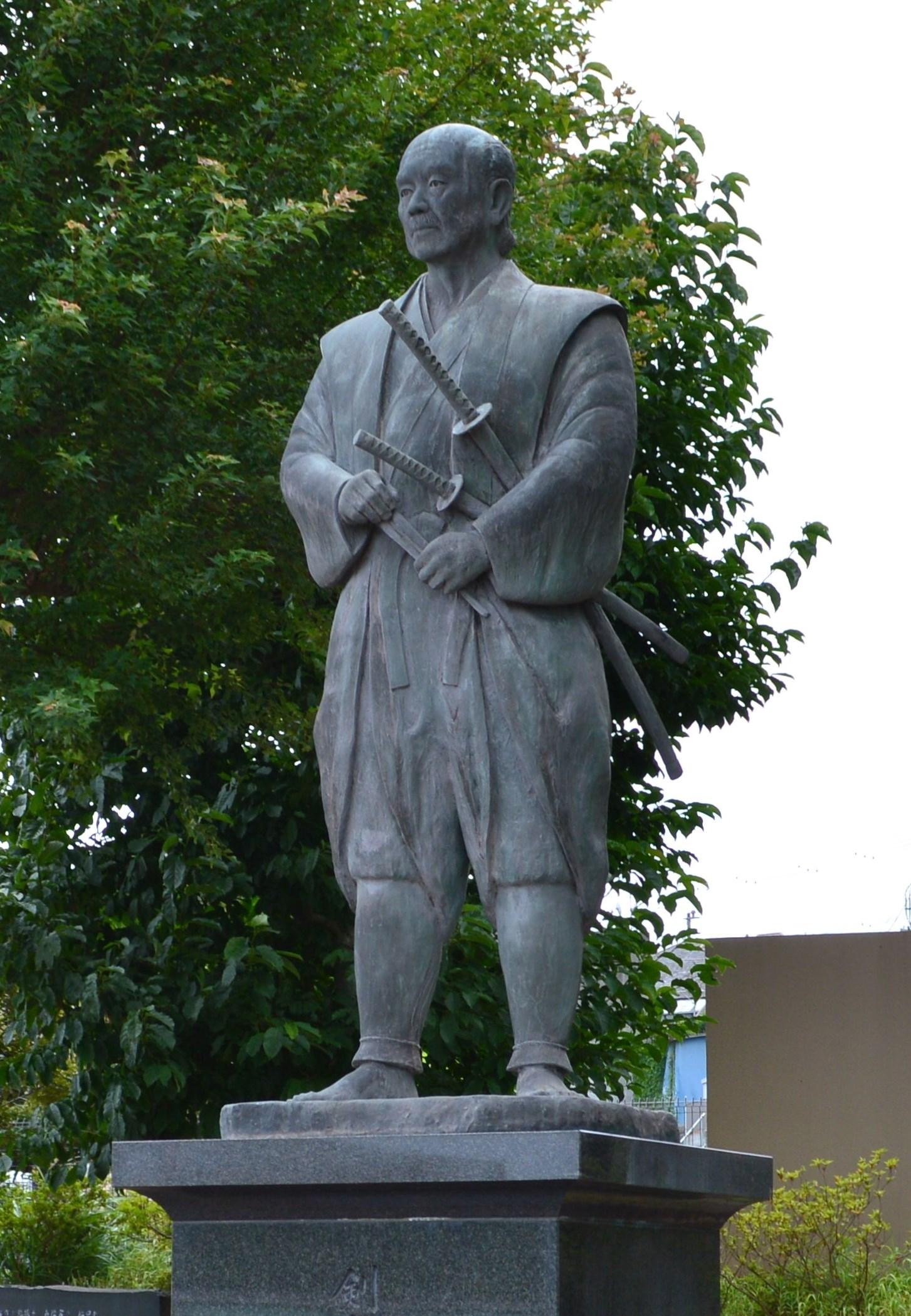 塚原卜伝像 (鹿嶋市内)